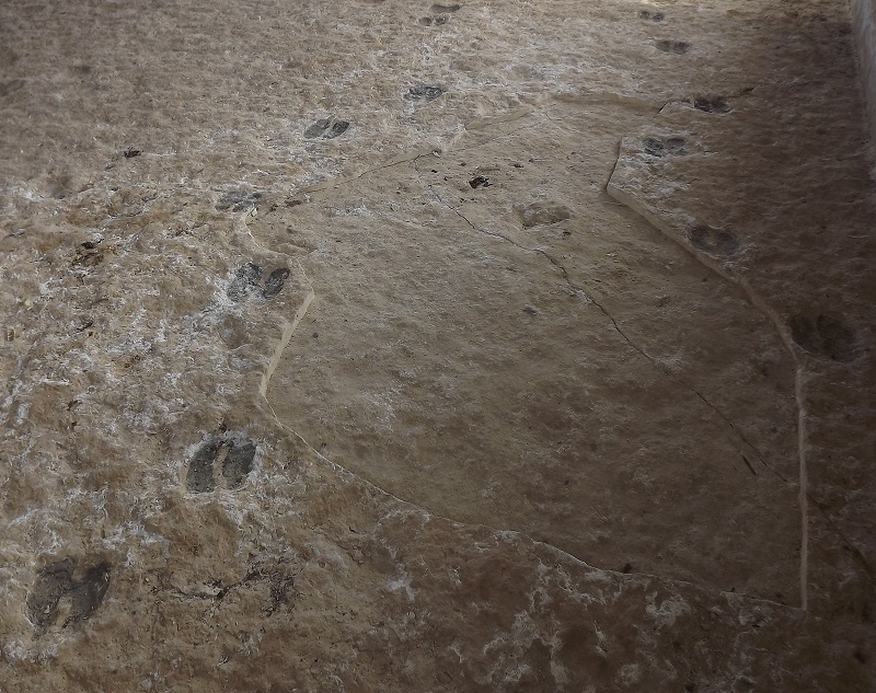 Huellas de Paracalemus jumillensis en yeso en el Yacimiento de la Hoya de la Sima (Jumilla)